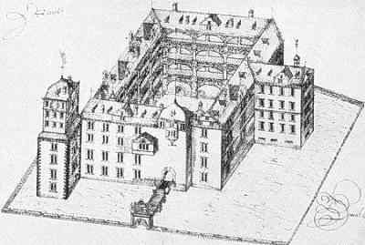 Schloss Ottweiler, Zchn. v. Heinrich Hoer, 17. Jh.